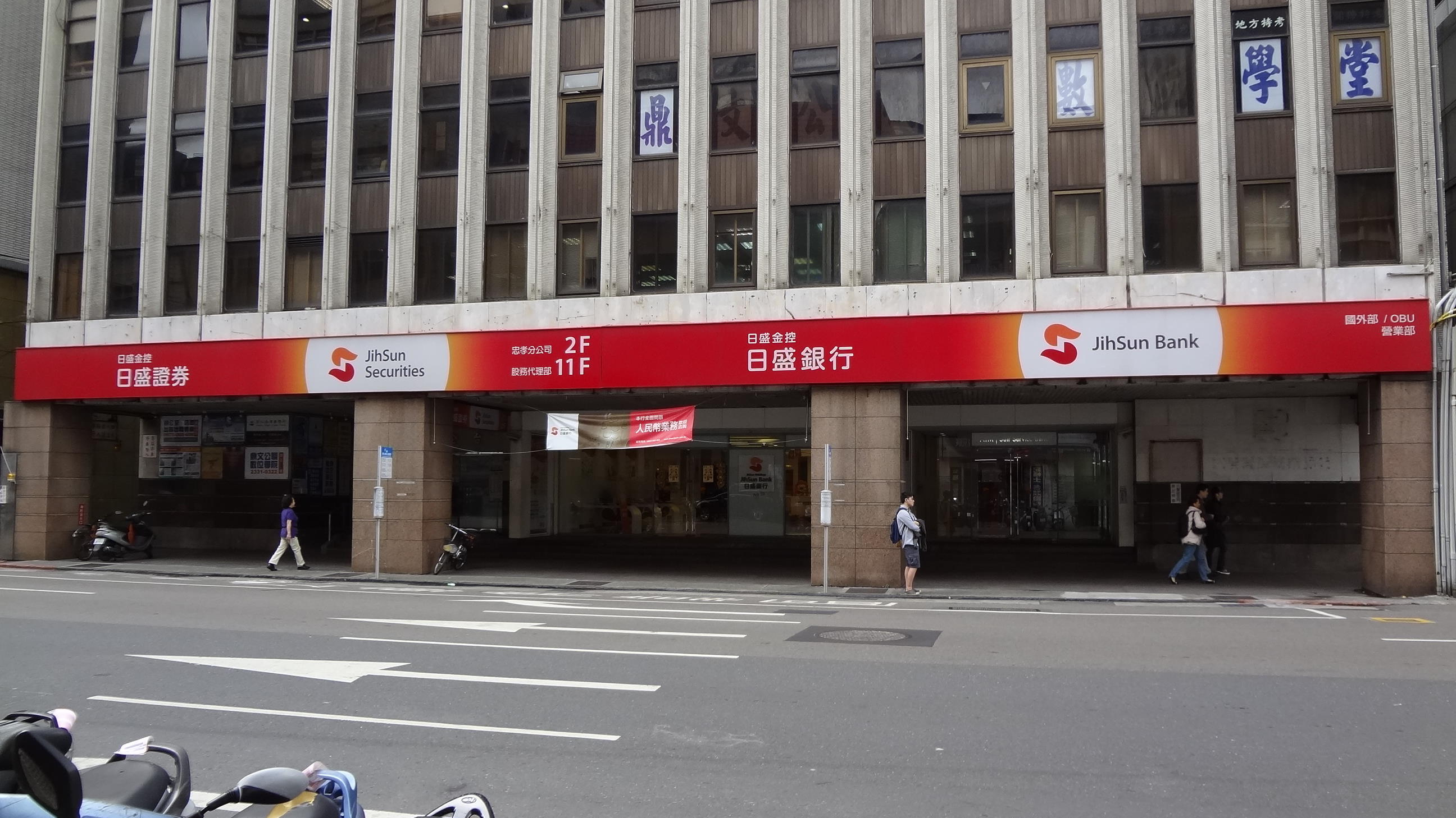 日盛國際商業銀行營業部與國外部，地址：臺北市中正區重慶南路一段10號1樓（台企大樓）。